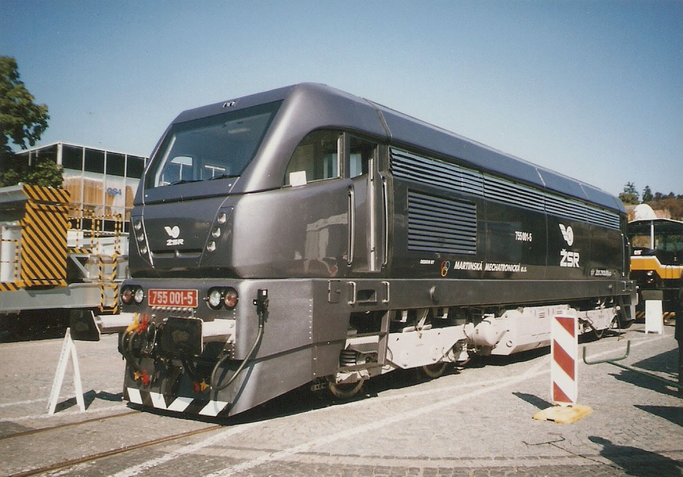 Slovenská 755.001 na veletrhu v Brně